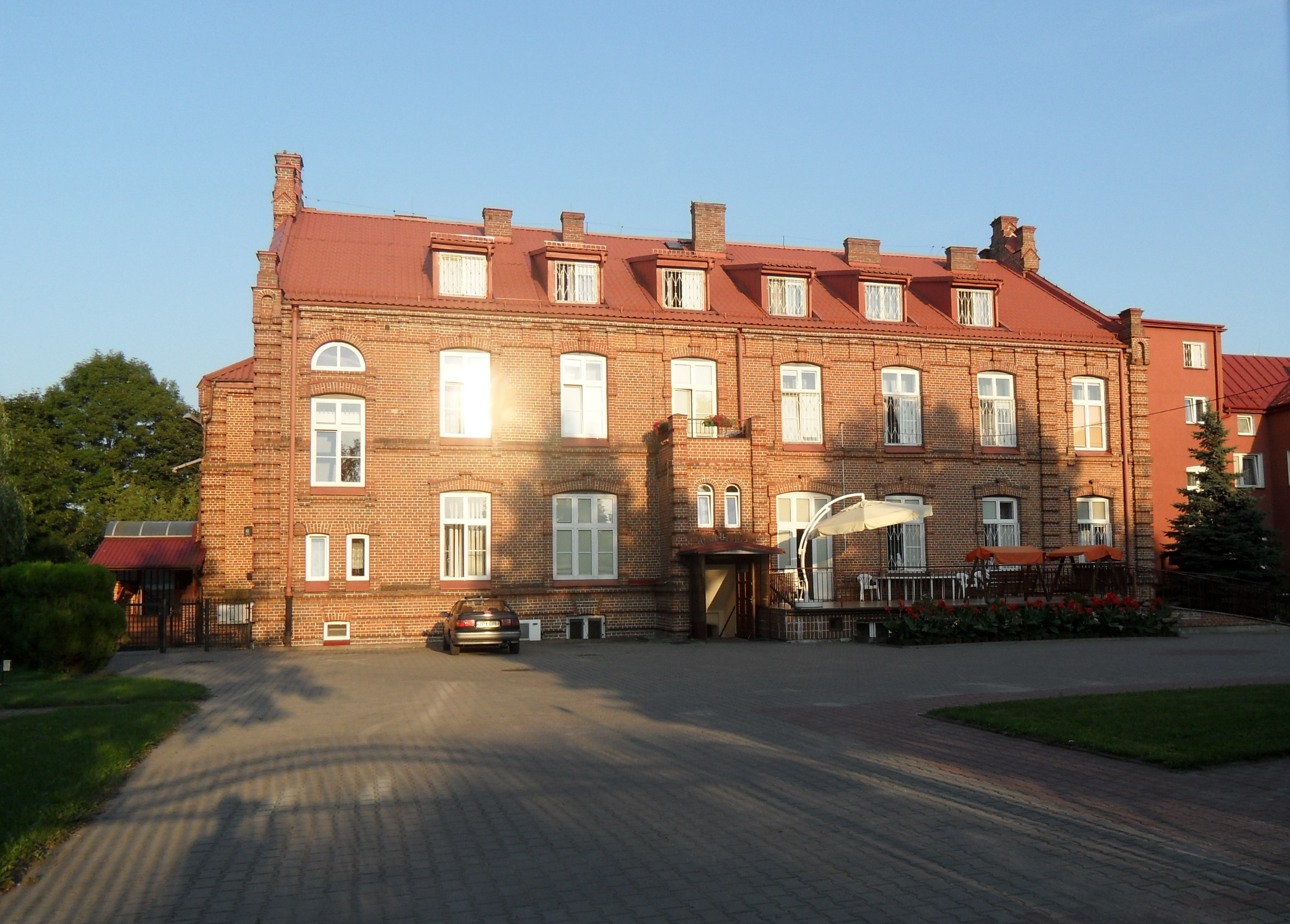 Dom pomocy społecznej w Pruszkowie przy ul. Żbikowskiej